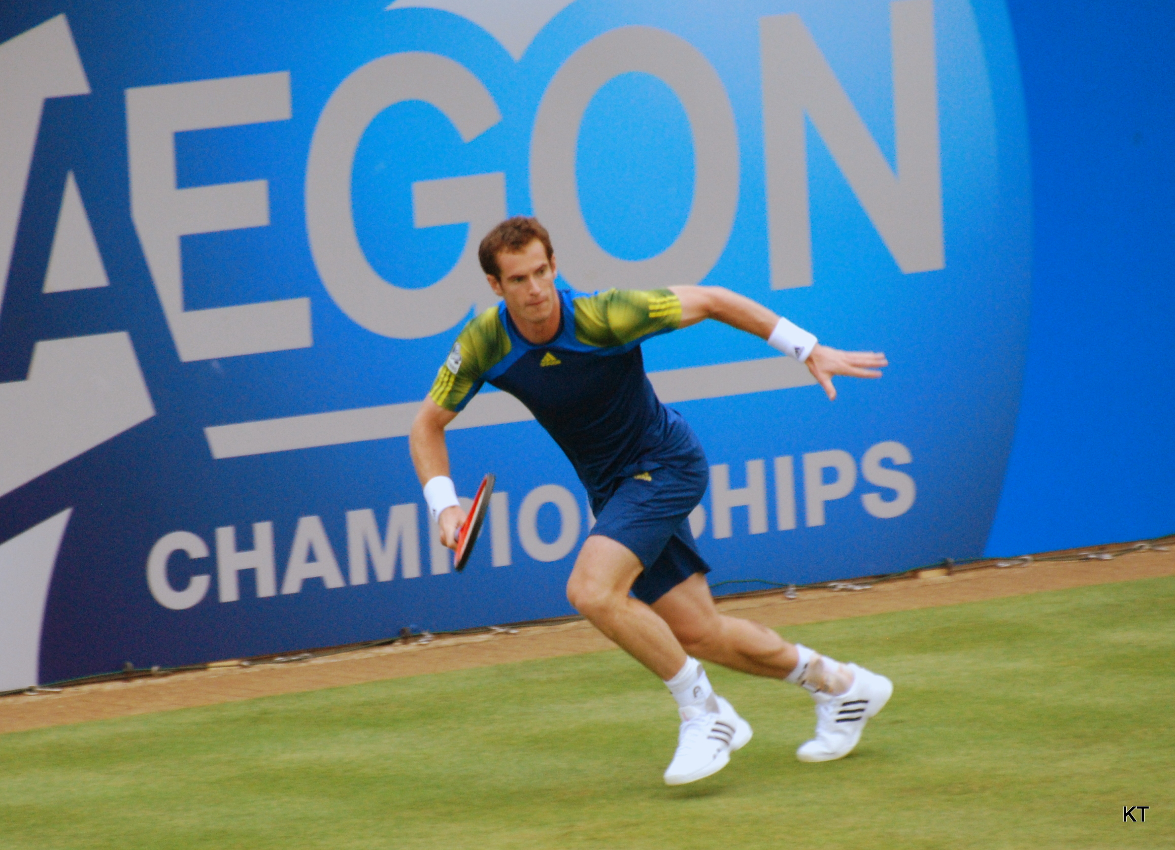 Running for a ball